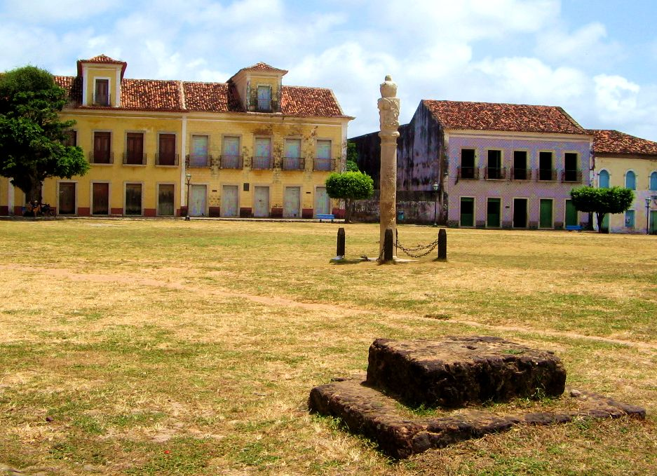 Alcântara, MA: conjunto arquitetônico e urbanístico; Pelourinho de Alcântara; Praça da Matriz (Largo de São Matias).